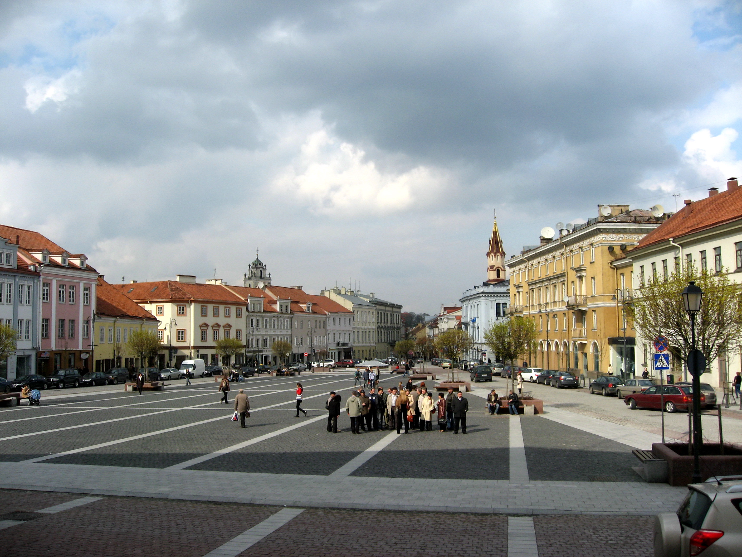 Vilnius, náměstí u radnice